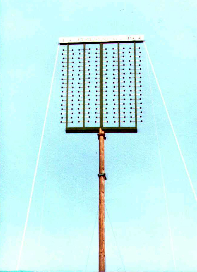 De Raek oftewel Hark